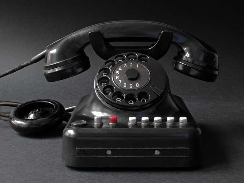 Telefon W48 Nebenstelle und Mithör-Muschel